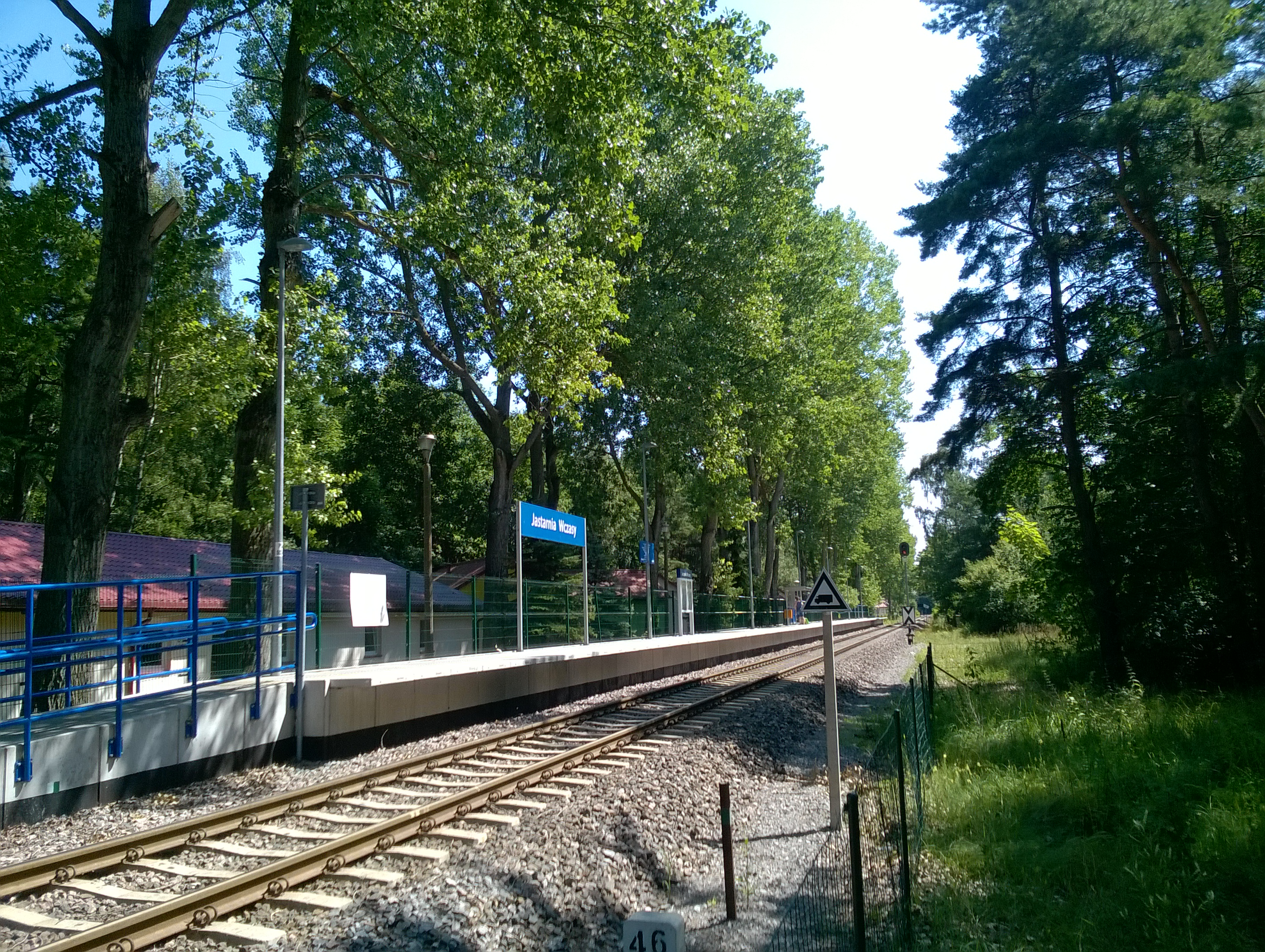 Przystanek osobowy Jastarnia Wczasy